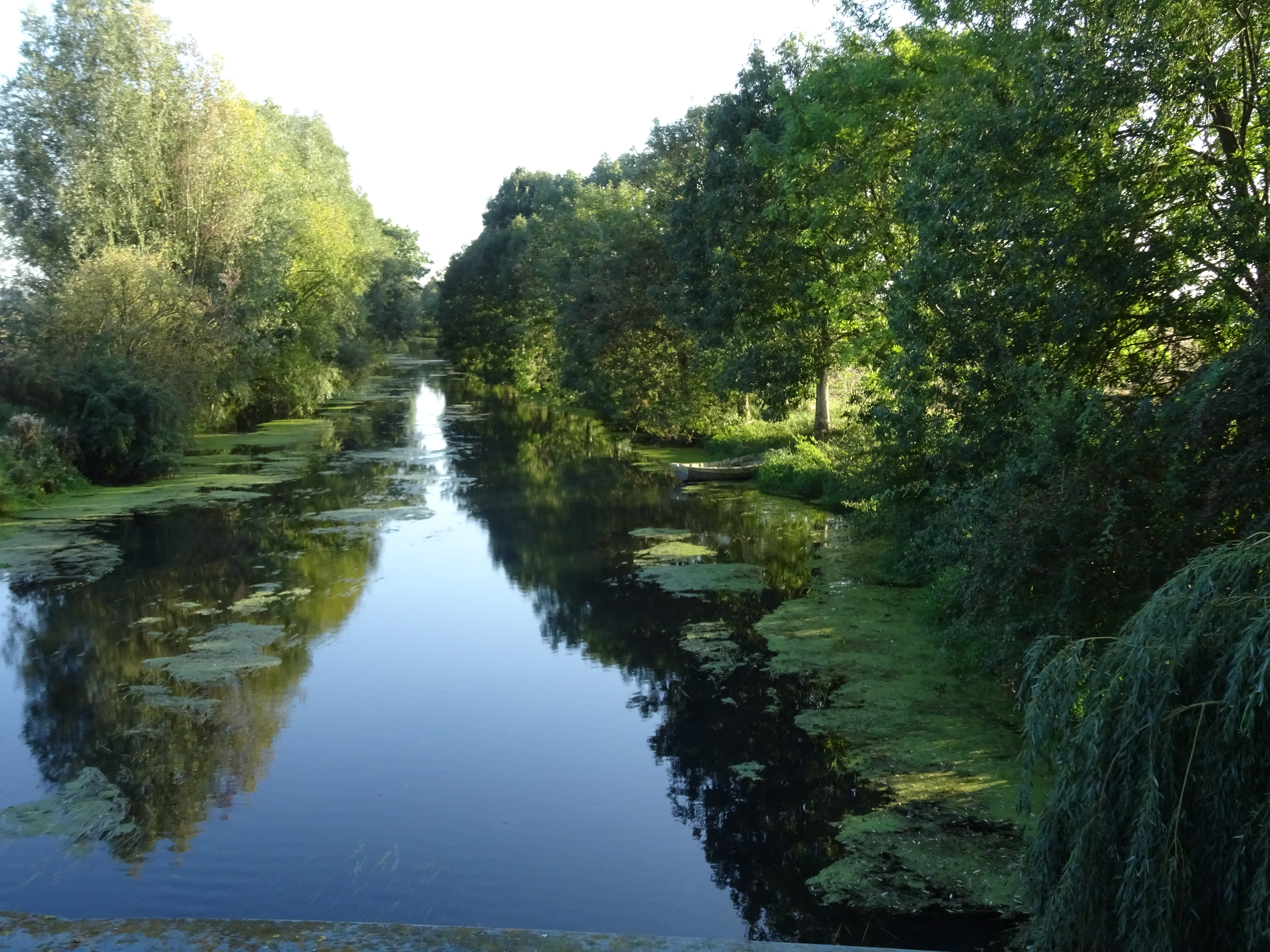 Kalflak bei Huisberden im Naturschutzgebiet „Deichvorland bei Grieth mit Kalflack“ (NSG KLE-033)